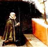 Bernard von Geismar 1622, Gemälde auf dem Seitenaltar in St. Johannes Bapt. Warburg